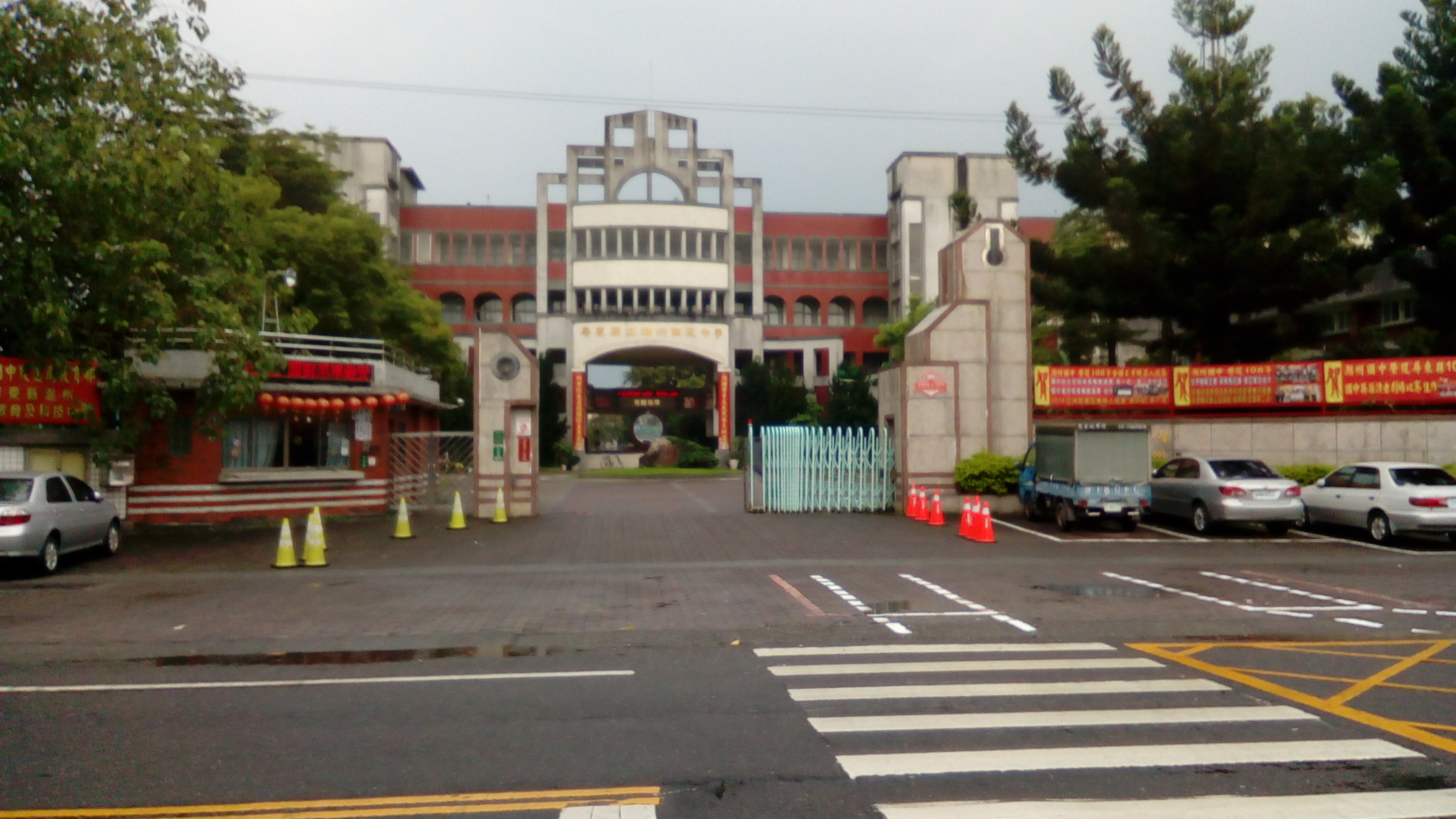 位於潮州延平路上